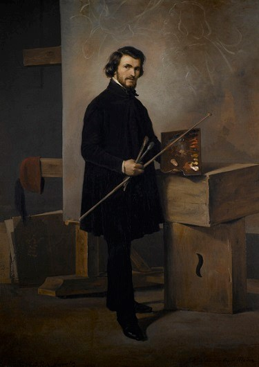 Autoritratto, olio su tela, 218 x 151.5 cm, Galleria d'arte moderna, Milano